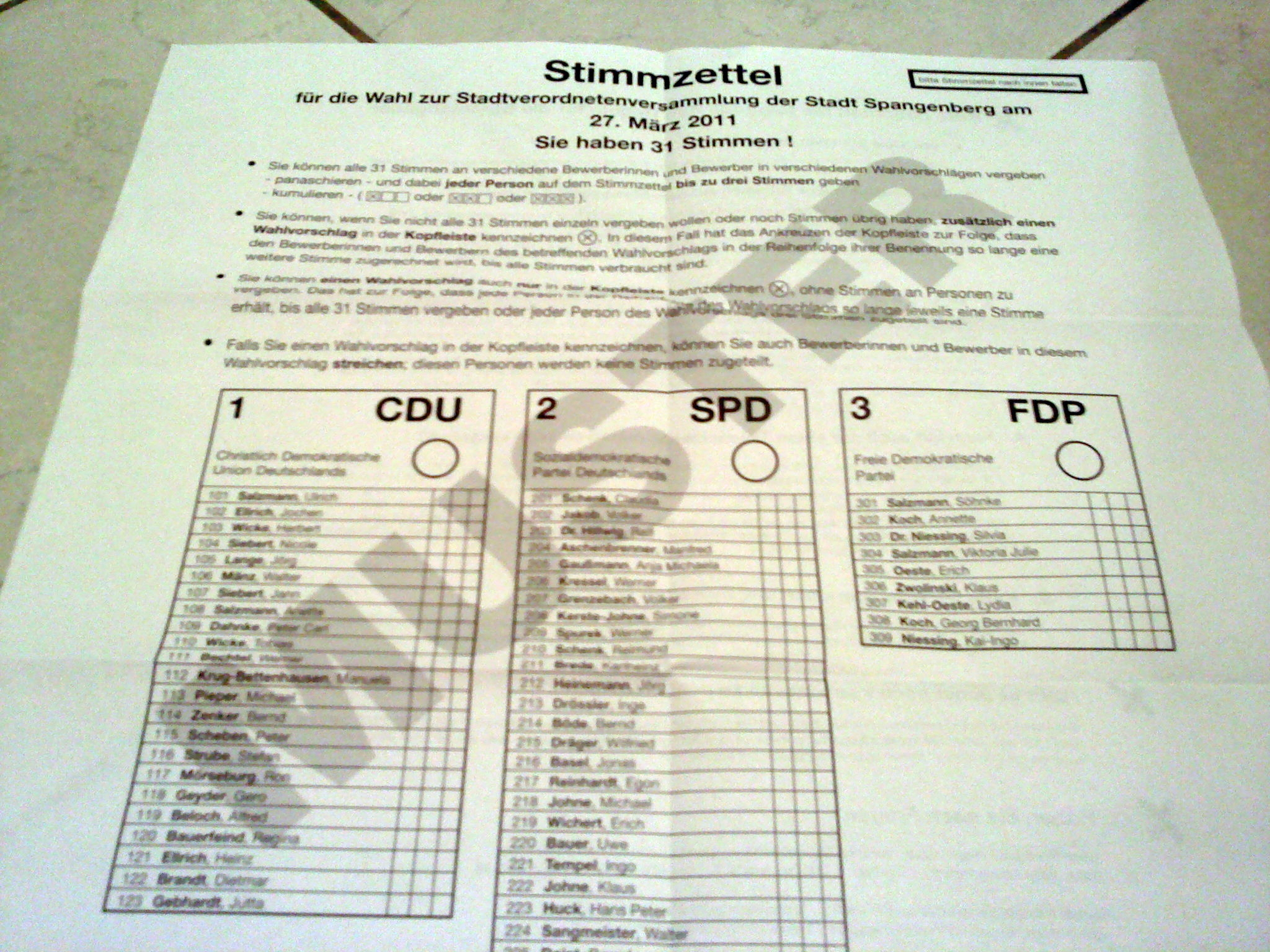 Musterstimmzettel zur Wahl der Stadtverordnetenversammlung in Spangenberg am 27. März 2011